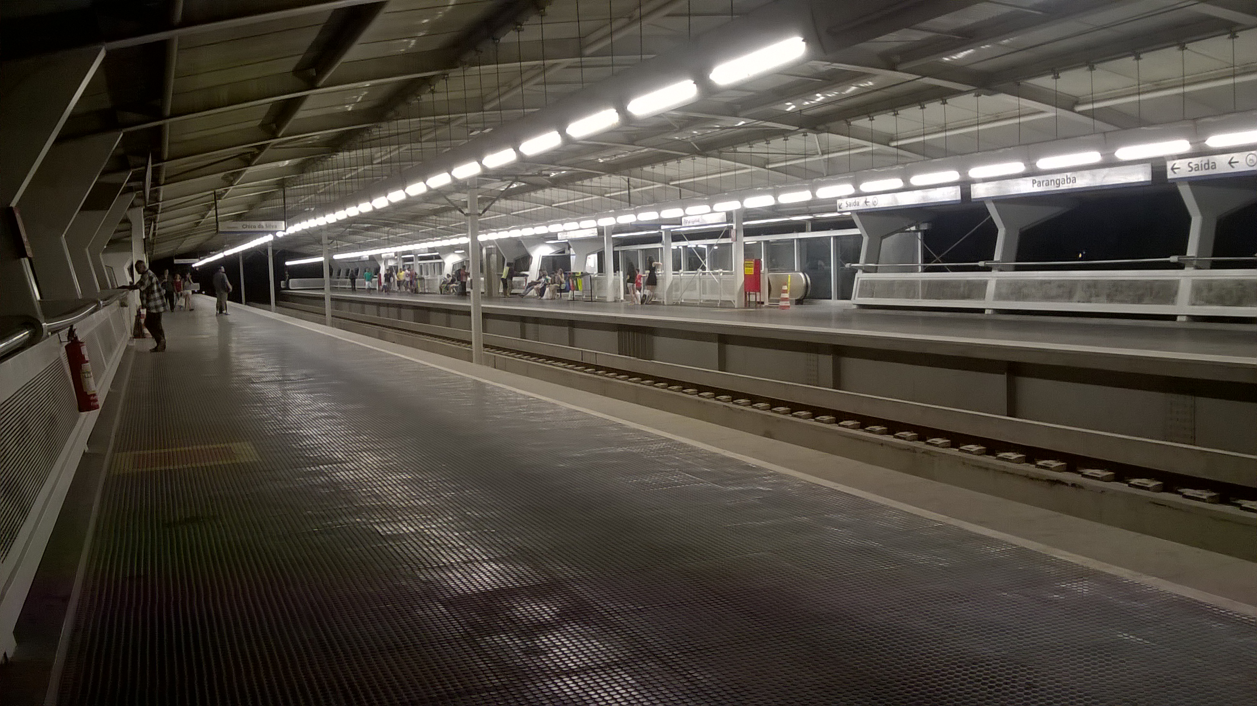 Plataforma da Linha Sul na estação Parangaba durante o período noturno